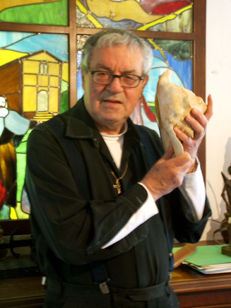 Luciano Marrucci